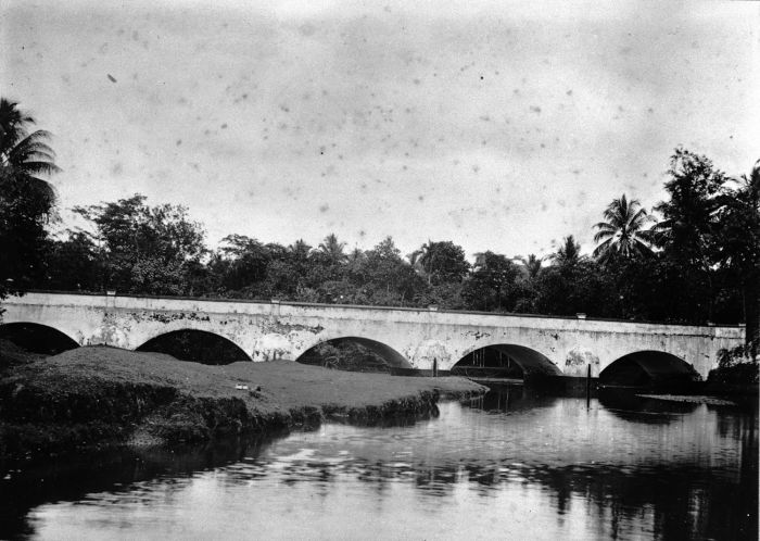 Foto. Boogbrug van Waterstaat over de Brem-rivier, op de weg van Soekaradja naar Poerbolinggo bij de dessa Klahang, Midden-Java